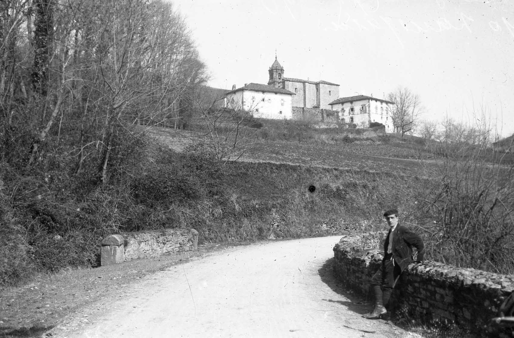 Indalecio Ojanguren Aiako Laurgain auzoan. Data ezezaguna bazaigu ere, XX. mende hasierakoa dirudi, kontu egin dezagun Indalecio 1887. urtean jaio zela.